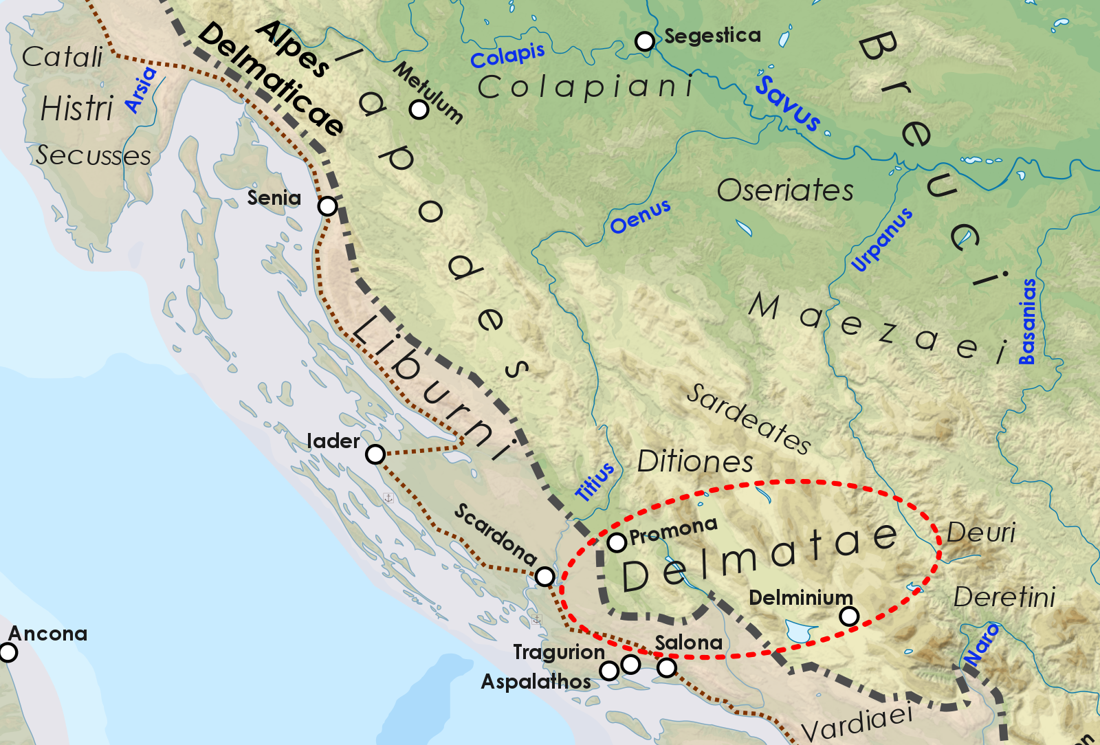 La popolazione dei Delmatae (40 a.C.)